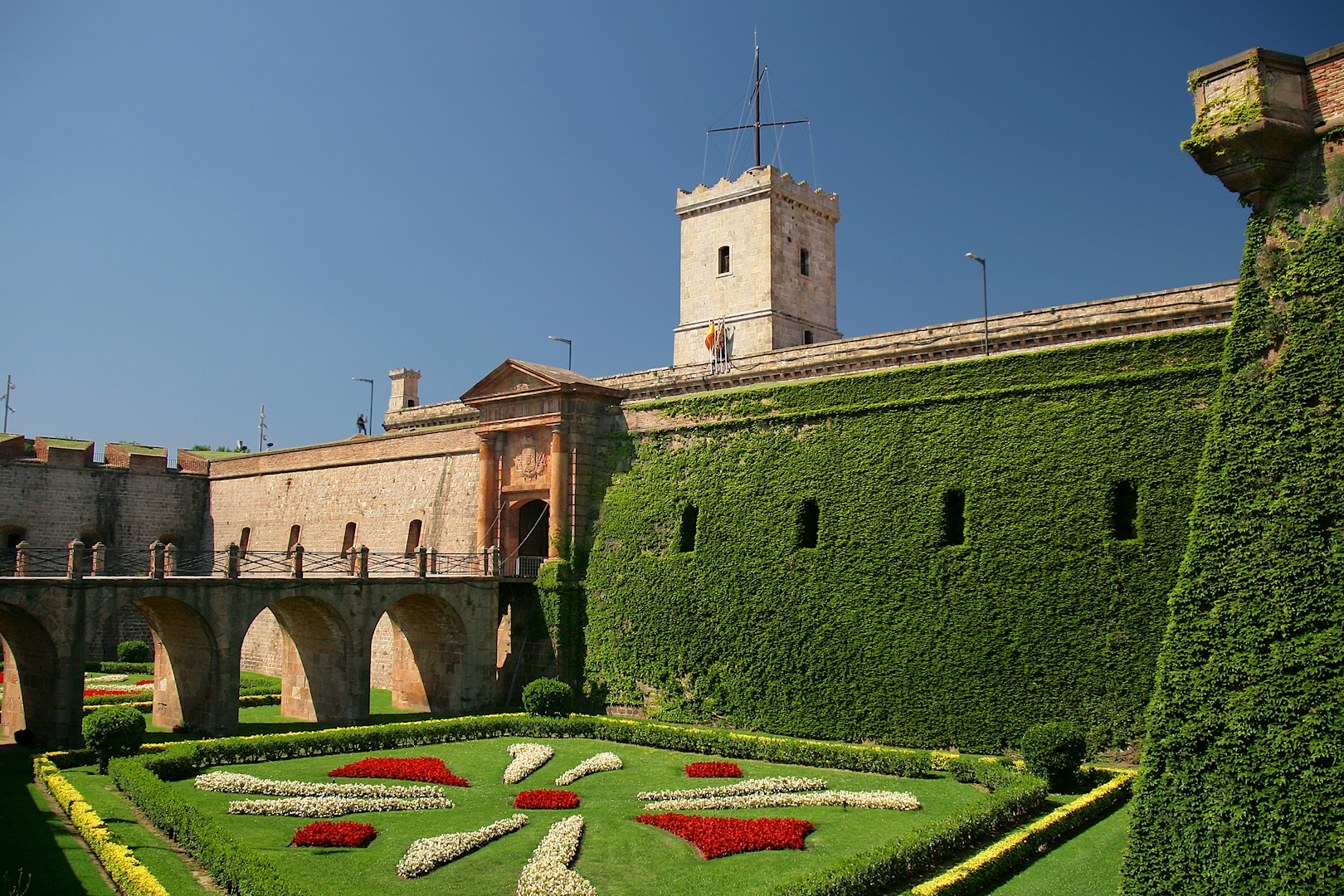 Castell de Montjuïc